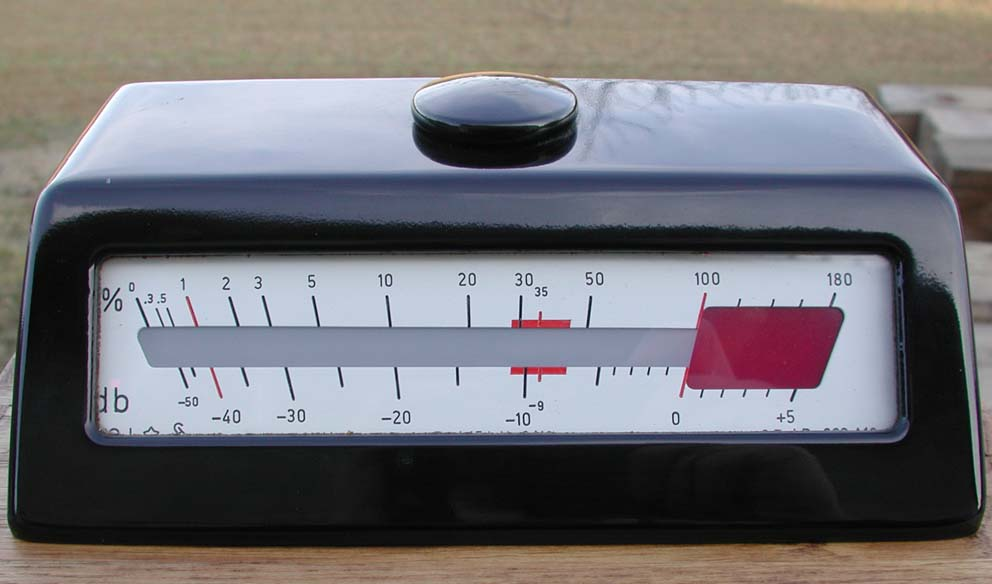 Lichtzeiger Instrument Siemens & Halske / WSW Österreich